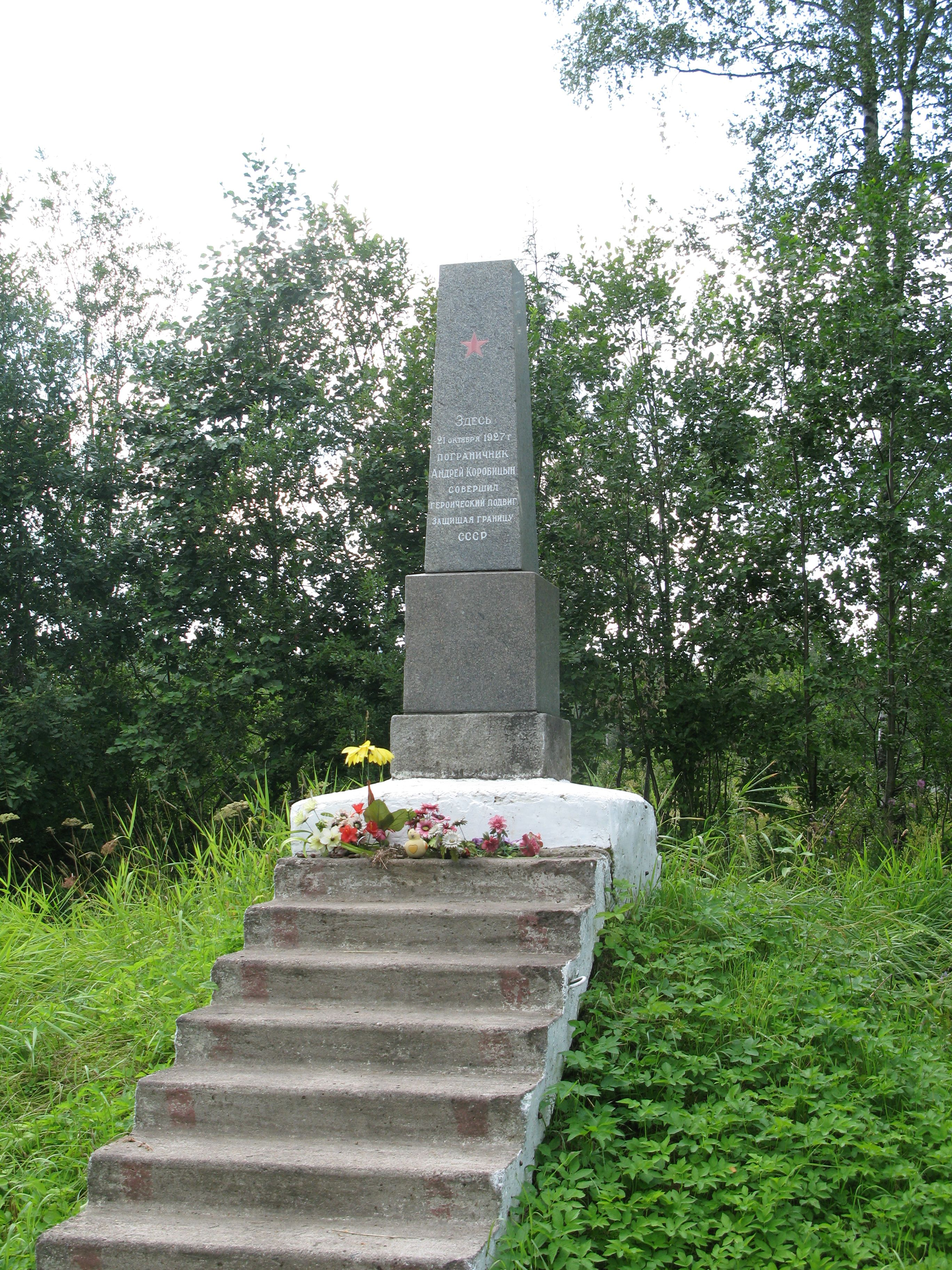 Памятник на месте совершения подвига Коробицыным